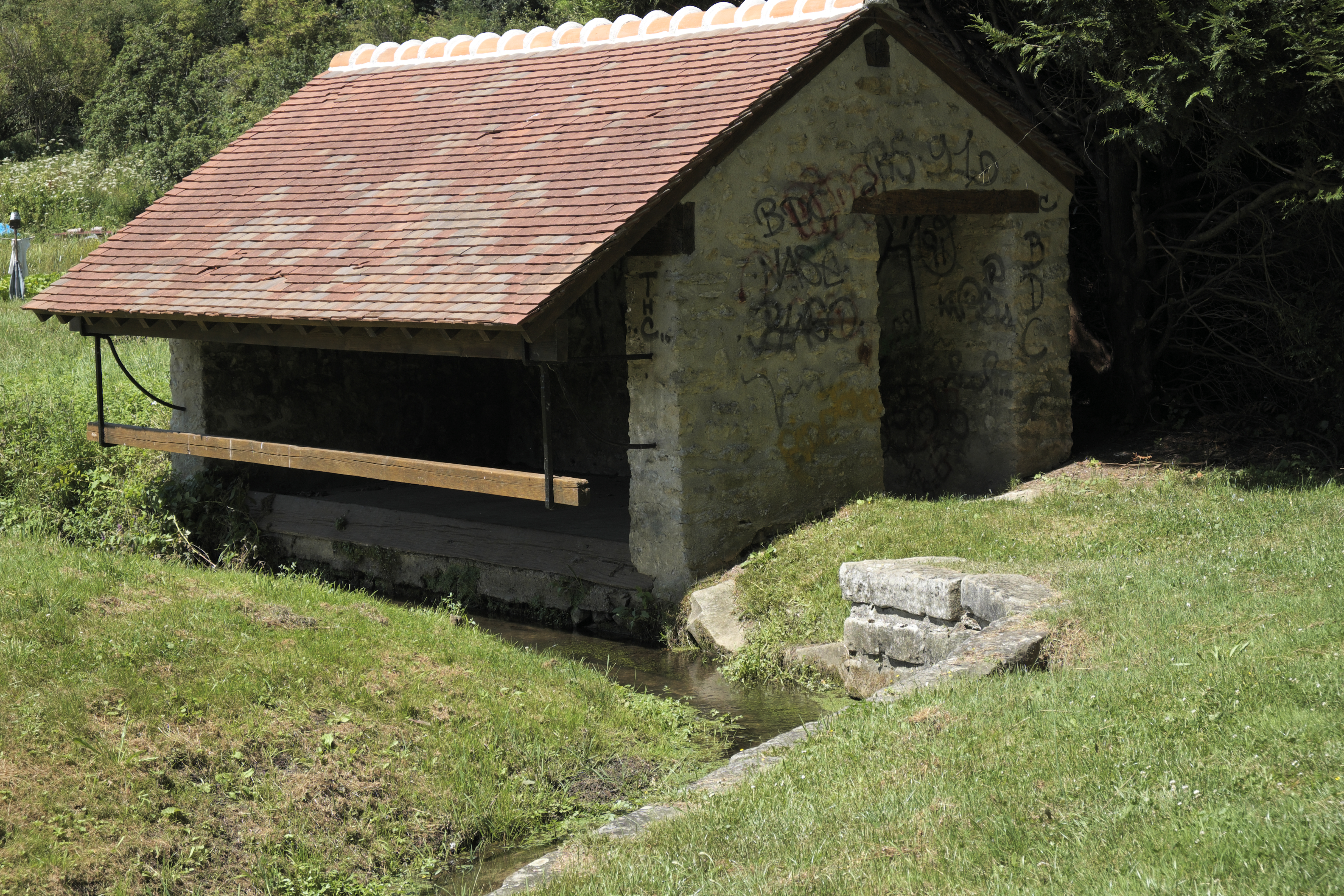 Waschhaus (Lavoir) in Guillerval im Département Essonne (Île-de-France/Frankreich)